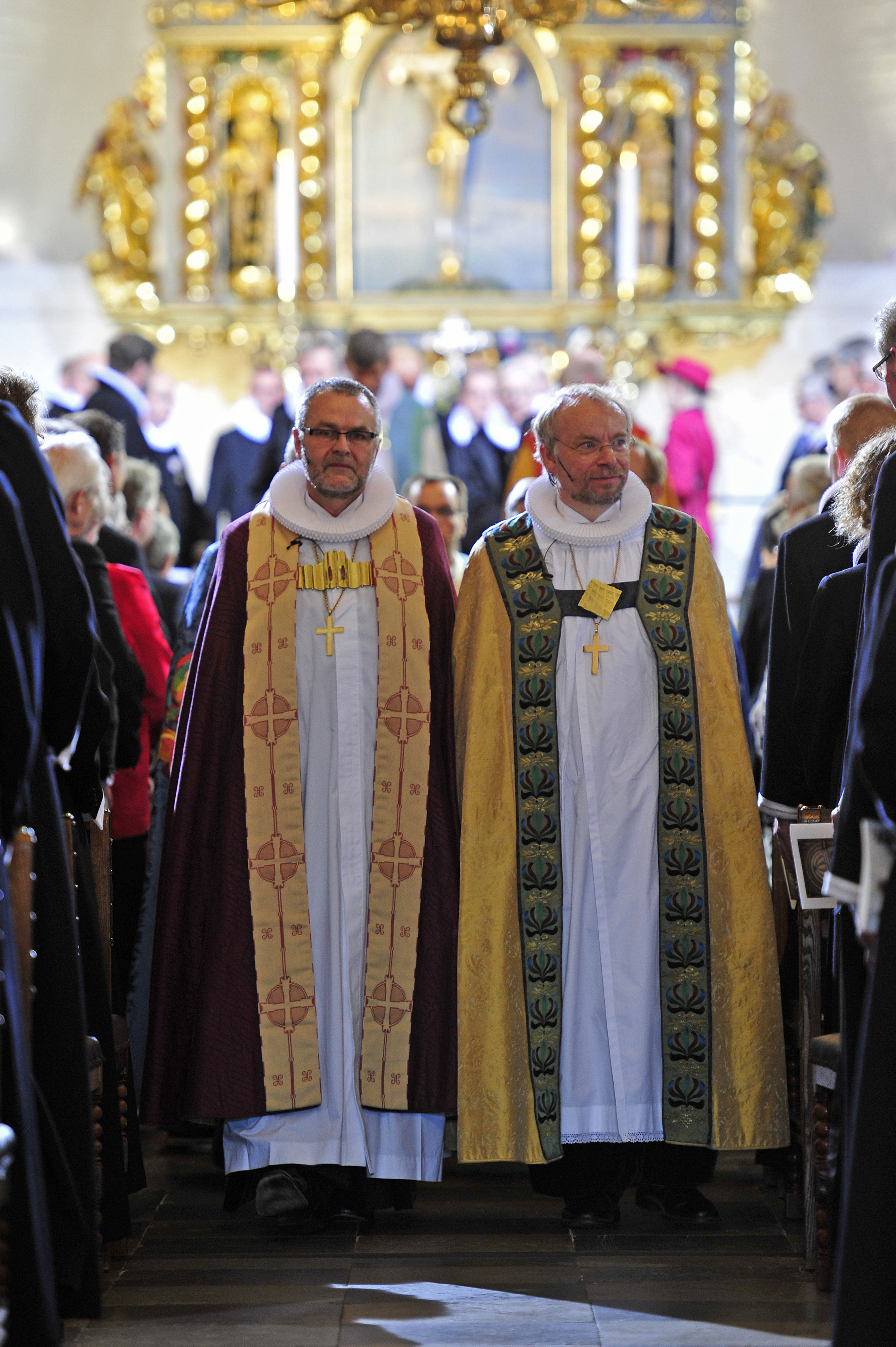 Biskop Henning Toft Bro (tv) og biskop Peter Skov-Jakobsen (th) fører processionen af biskopper og provster ud af Budolfi Kirke efter bispevielse af Toft Bro.